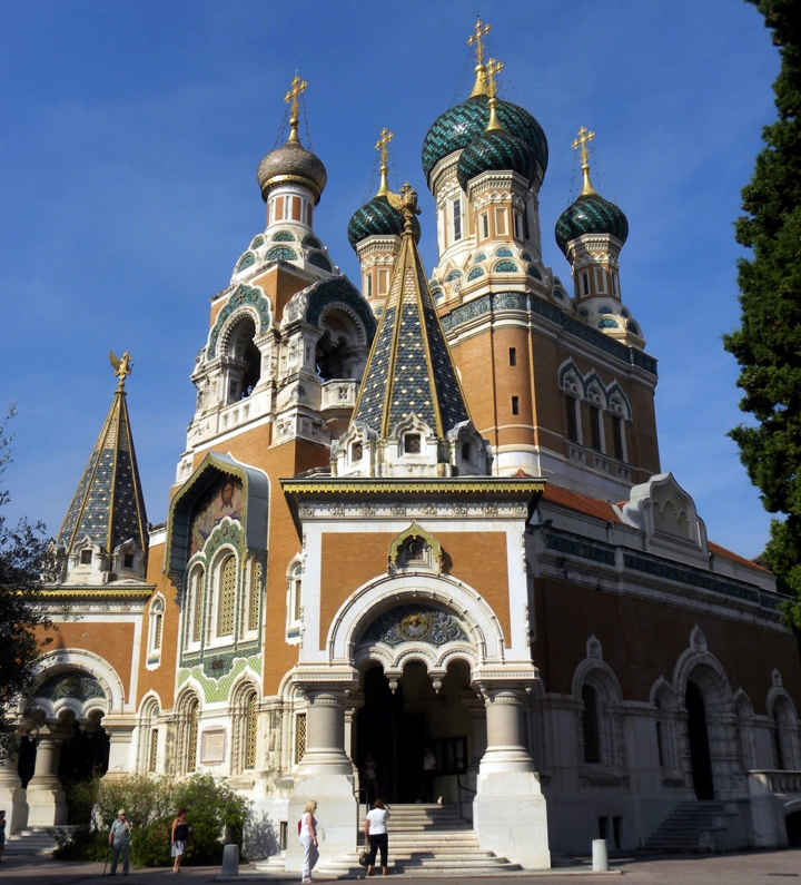 Nice, Avenue de Saint Nicolas .